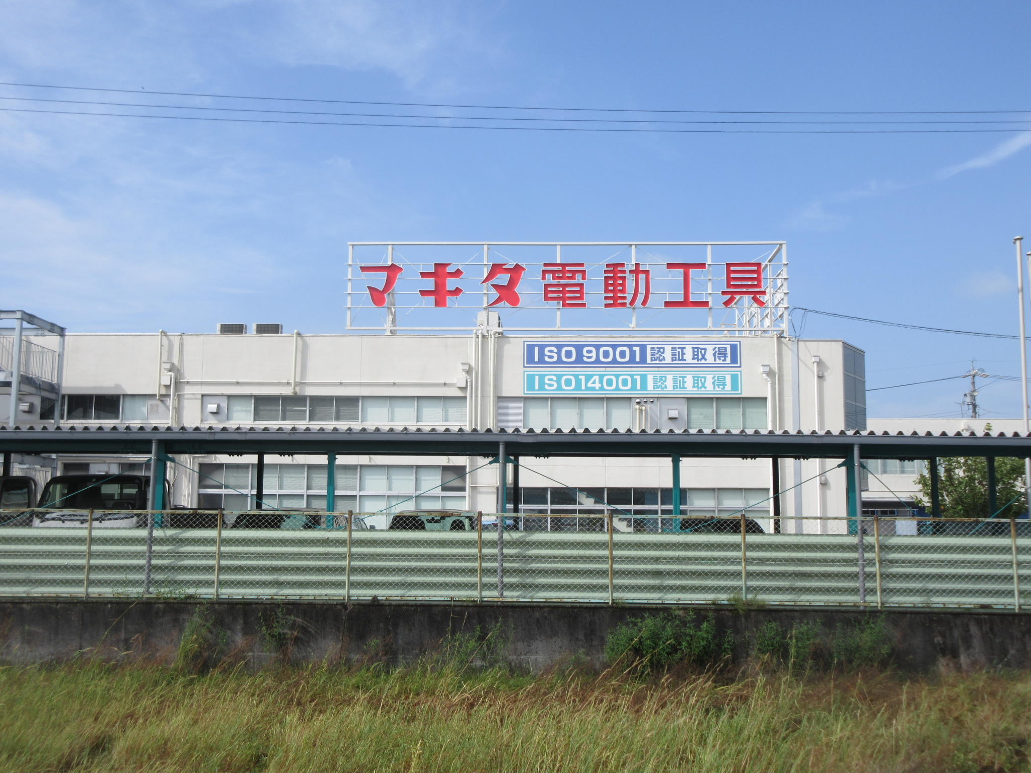 株式会社トーアの本社（岡崎市島坂町）。マキタの関連会社。